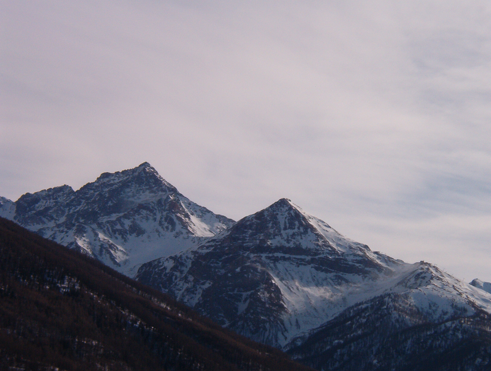 Punta Rognosa di Sestriere - Alpi Cozie - Piemonte - Italy